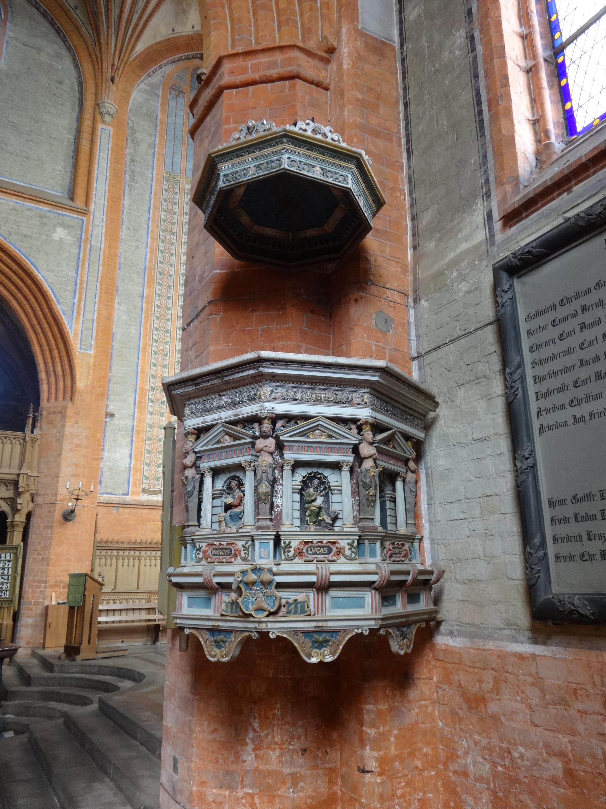 Die Johanniskirche wurde als dreischiffige Basilika im Stil der Backsteingotik erbaut. Sie steht in Malchin in Mecklenburg-Vorpommern.